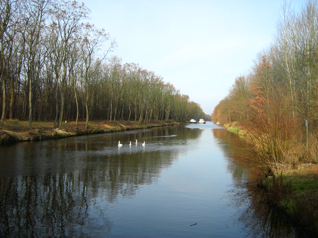 Der Oranienburger Kanal war vor dem Bau des Oder-Havel-Kanals ein wichtiger Kanal zur Verbindung der oberen- mit der unteren Havel und vor allem zur Verbindung der unteren Havel mit der Oder (via Finowkanal). Er verläuft westlich der Stadt Oranienburg. Heute sind die Schleusen an seinem nördlichen Ende nicht mehr vorhanden. So dient er jetzt hauptsächlich der Verbindung des Ruppiner Kanals mit der Havel. - Google Maps - Google Earth